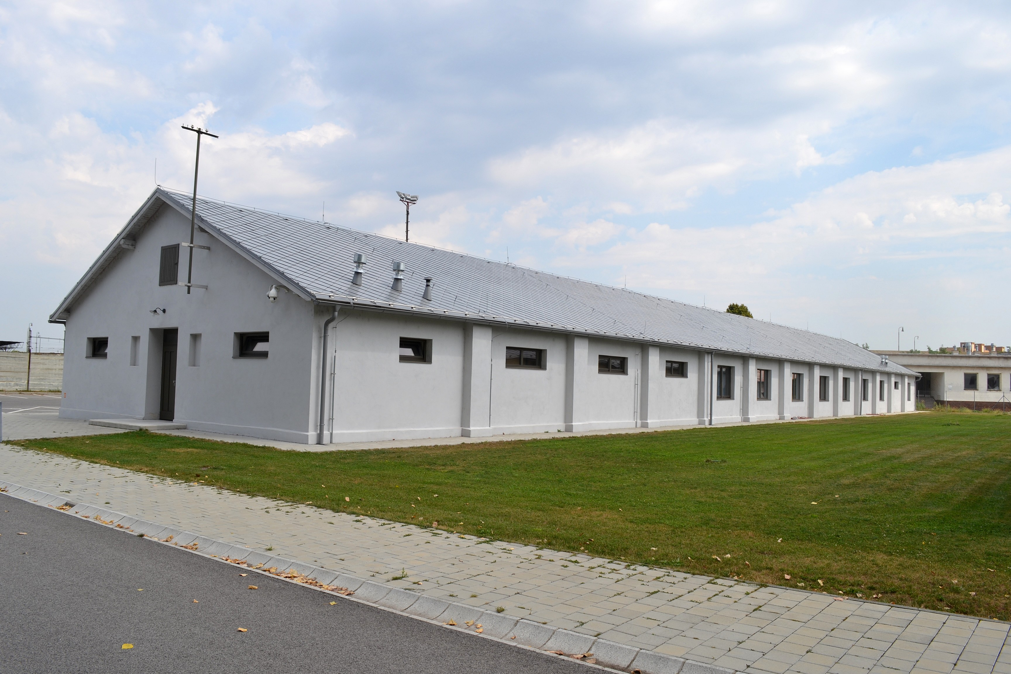 Sereď (okr. Galanta), Múzeum holokaustu; piaty barak